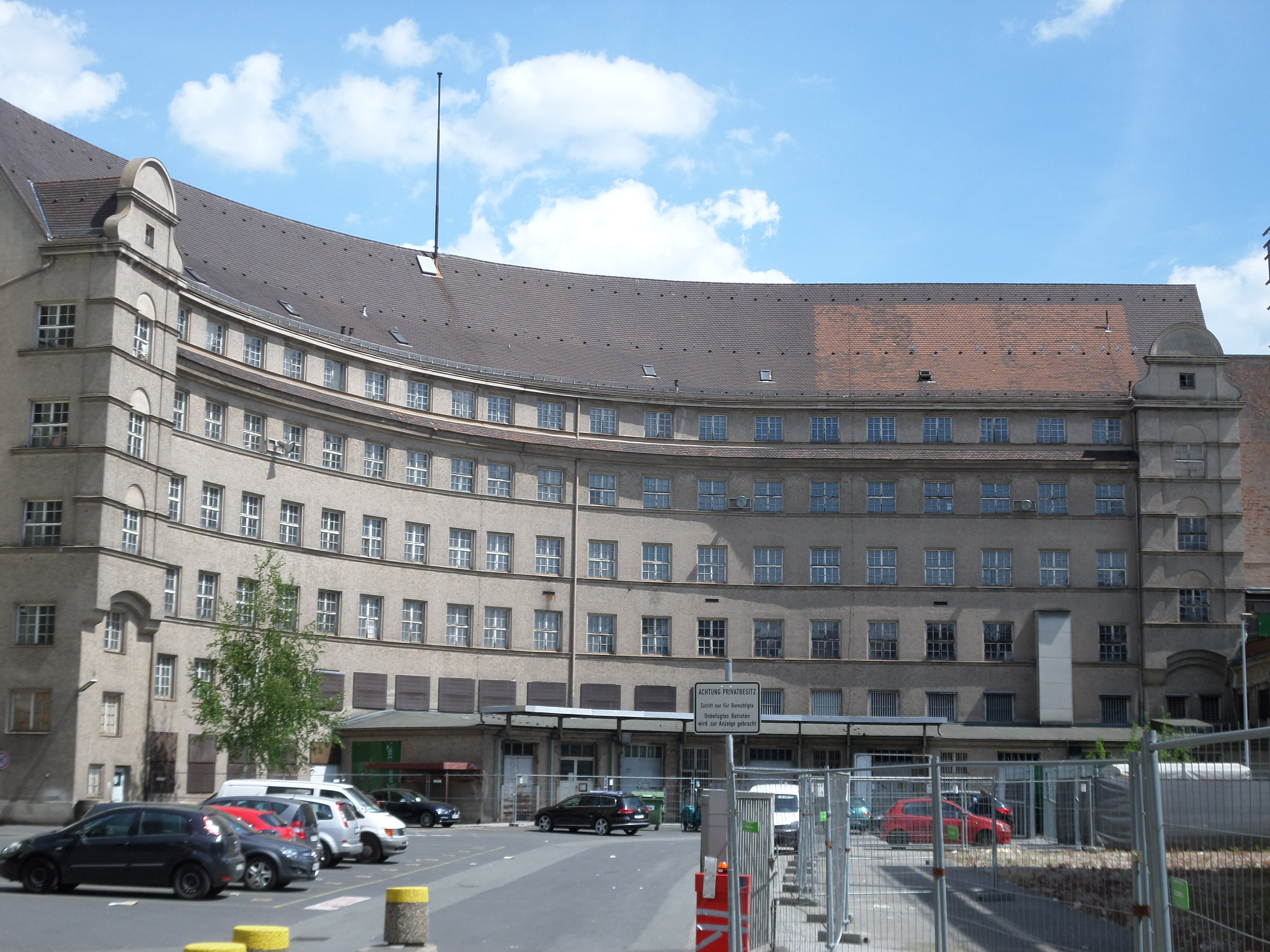 Bahnhofstraße 4 - Ehem. Oberpostdirektion - fünfgeschossiger Putzbau über viertelkreisförmigem Grundriss mit rustiziertem Erdgeschoss, Satteldach und Dachgauben, reduziert historisierende Formensprache, von Postarchitekten Hans Weiß und Johann Kohl, begonnen 1914, größtenteils ausgeführt 1920-24 - D-5-64-000-2282